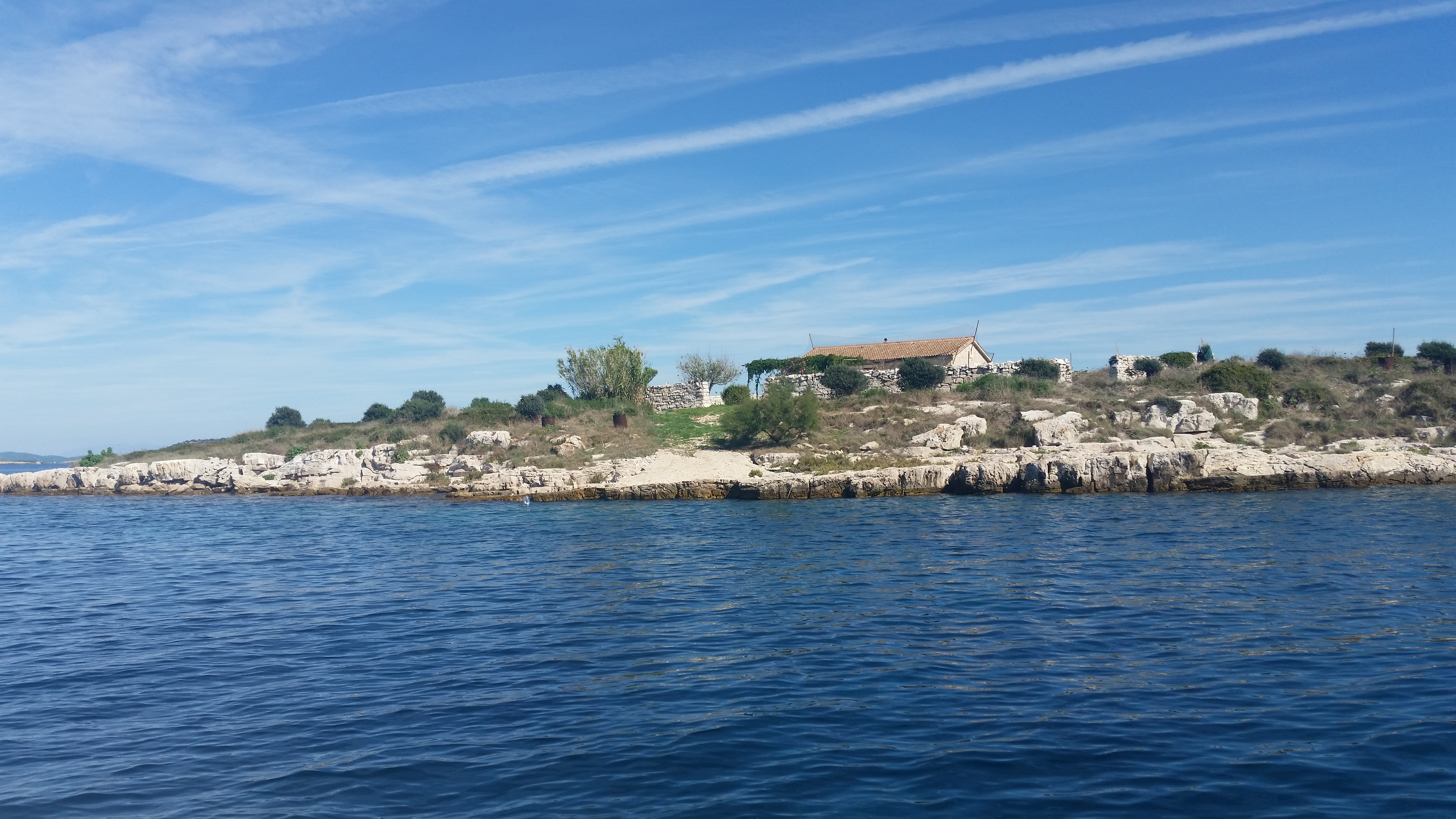 Croatia, Kornati, Otočić Ravna Sika Otočić Ravna Sika